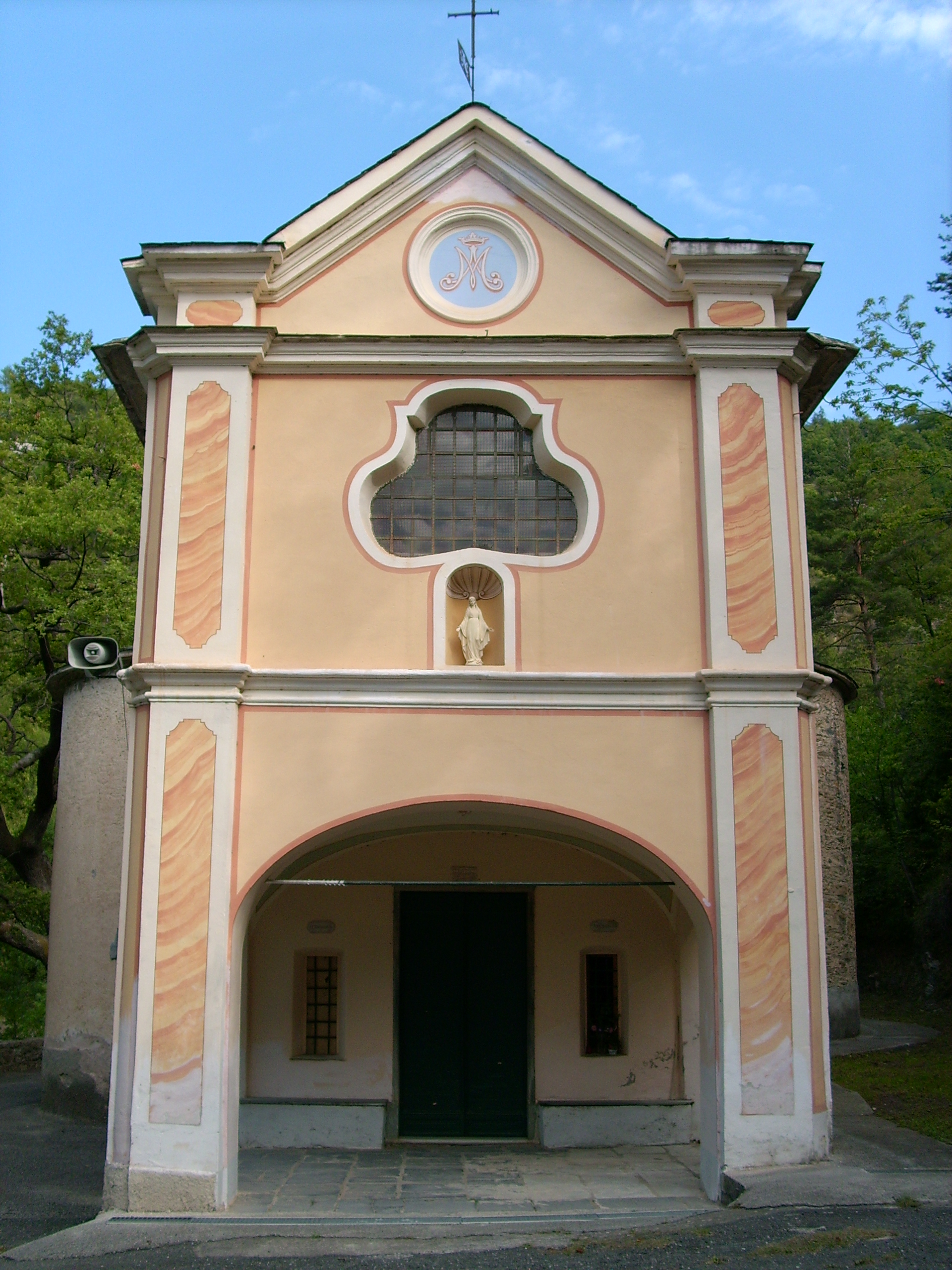 Santuario della Madonna della Chiazza di Pornassio, Liguria, Italia